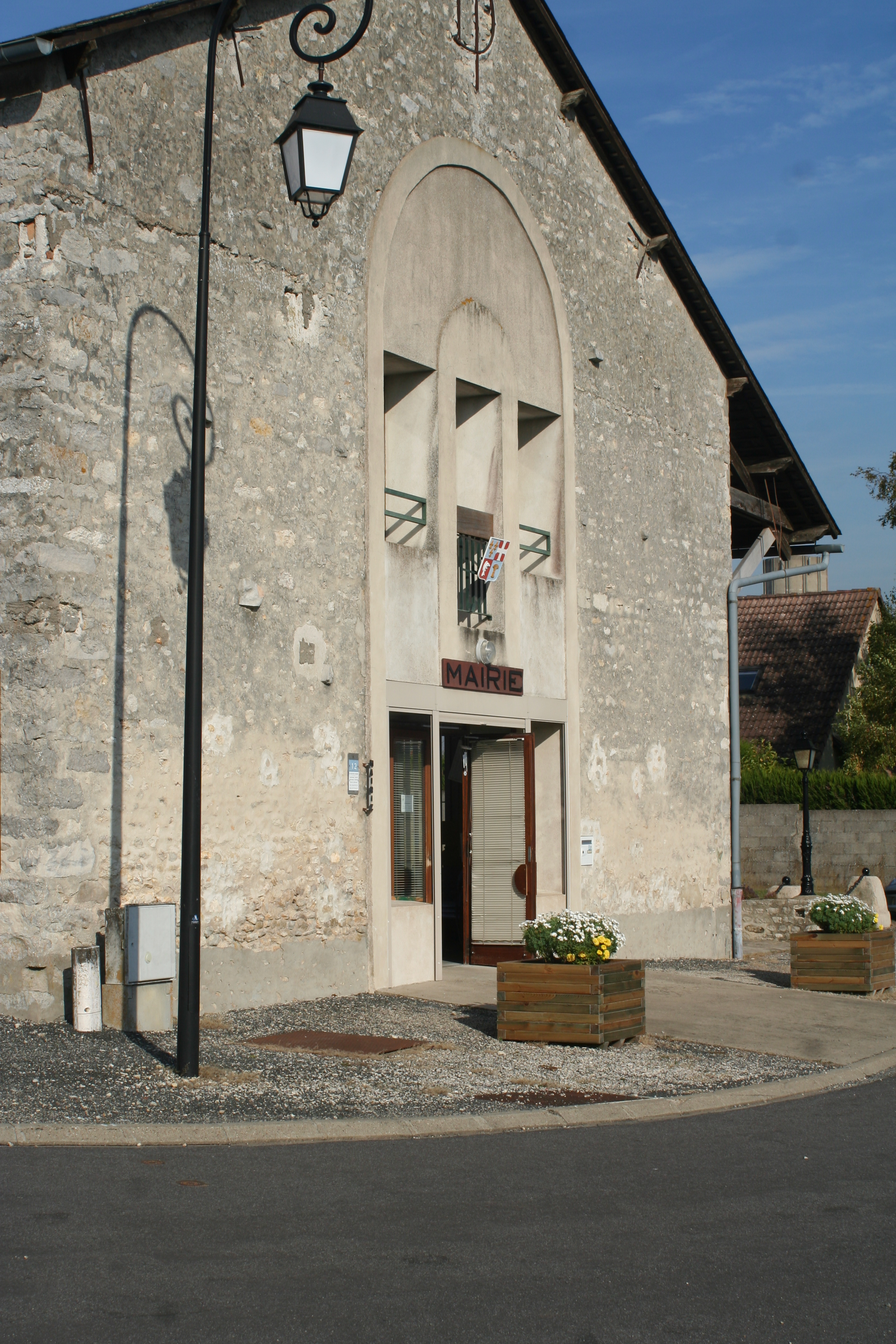 La Mairie de Chalou-Moulineux